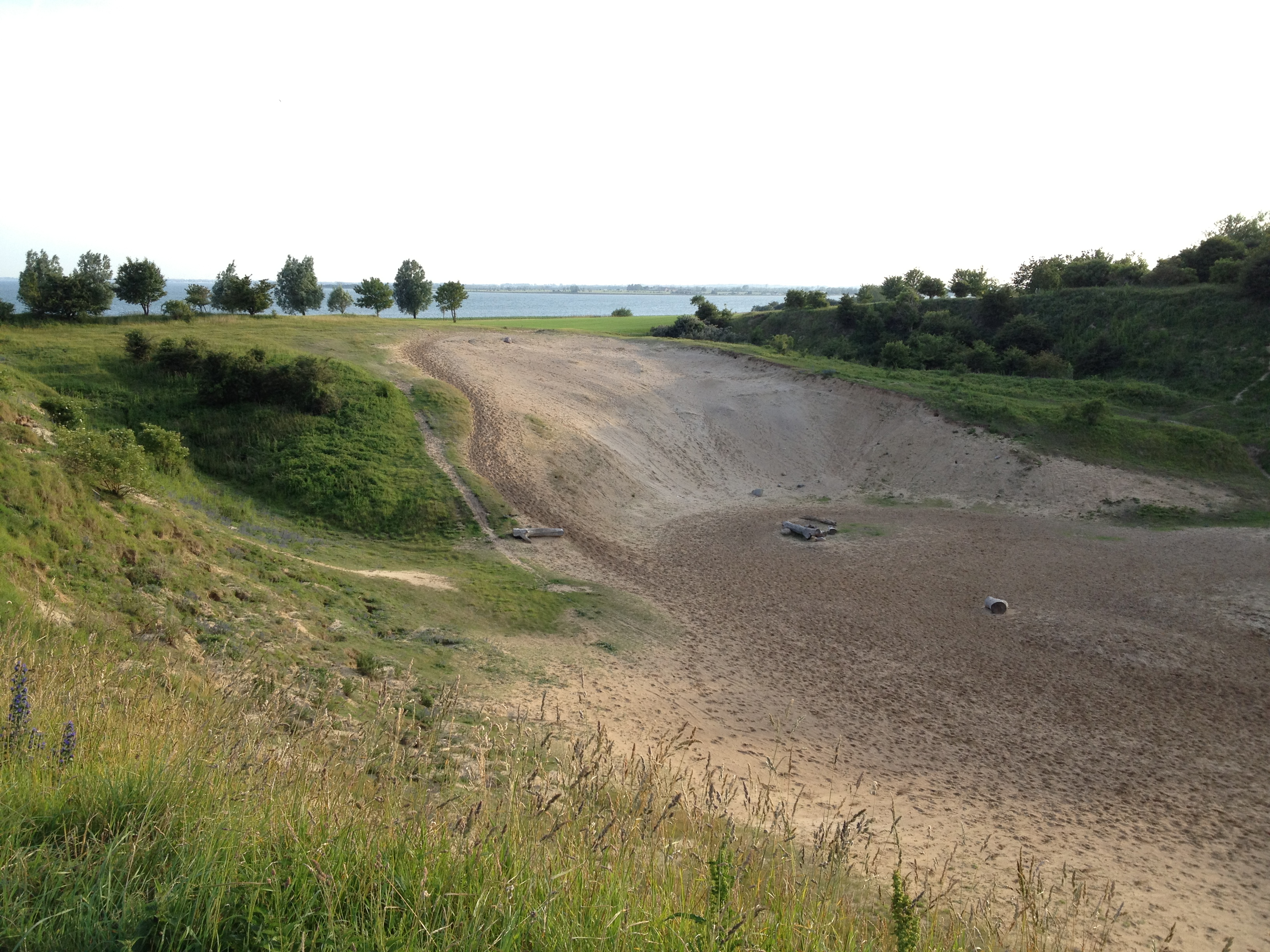 Für den Bau der Fehmarnsundbrücke wurde hier bis 1962 Kies abgebaut. Das Gelände ist 1972 vom Verein "Wulfener Berge e.V." zu einem Erholungs- und Naturgebiet (Wulfener Berge) rekultiviert worden. Die Grube ist heute für Ausritte der Reiterhöfe der Umgebung beliebt. Im Hintergrund ist die Ostsee zu erkennen.